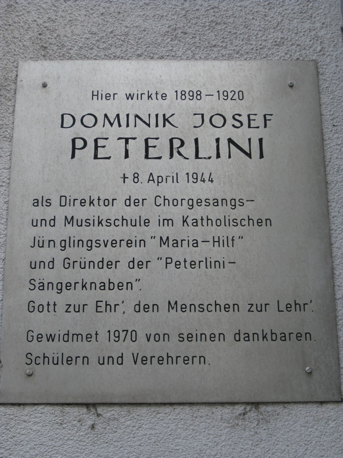 Dominik Josef Peterlini Gedenktafel, Westbahnstraße 40, 1070 Wien